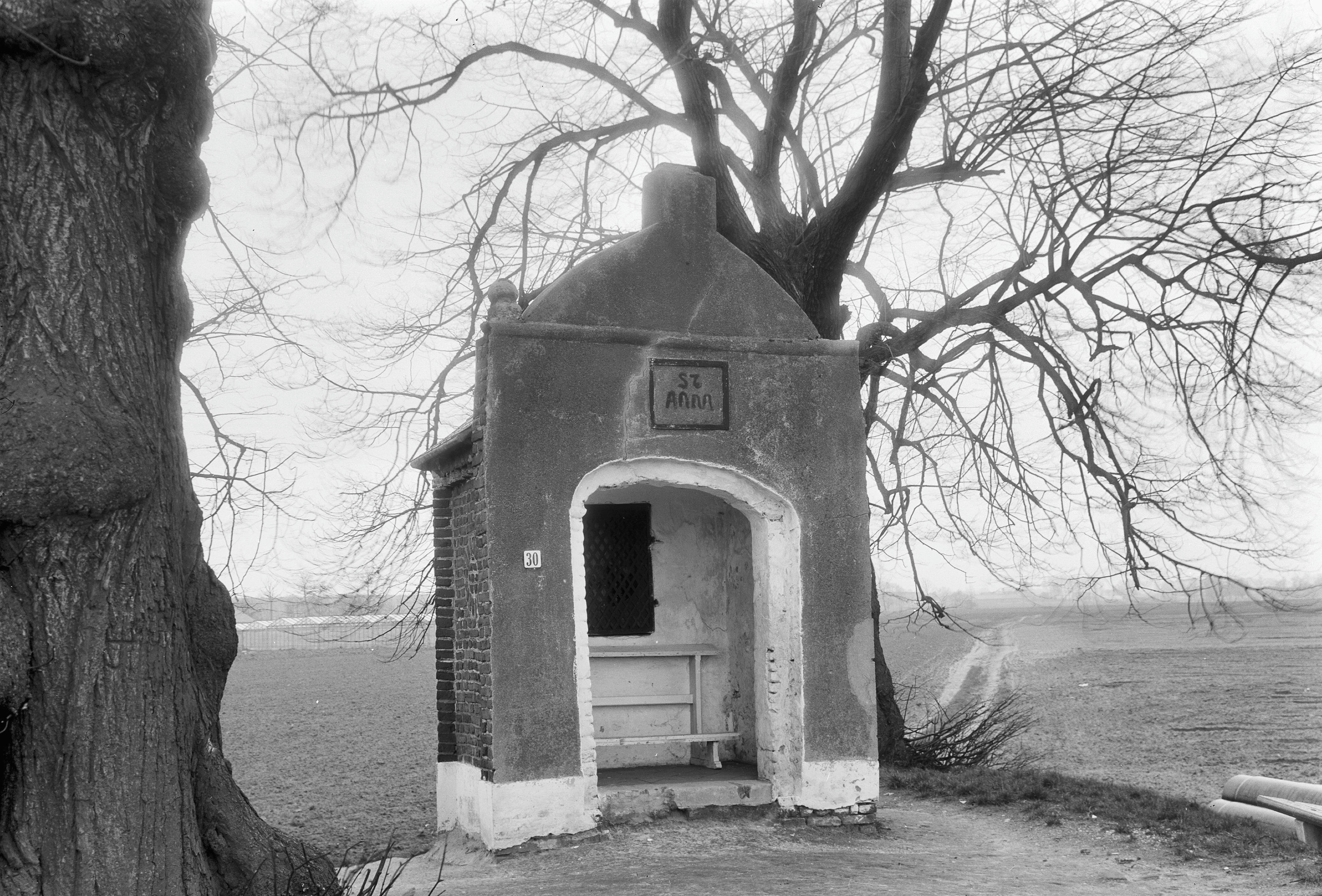 Diversen: Kapel, St.Anneweg 30, aanzicht